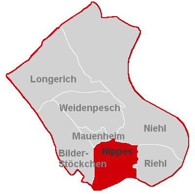 Lagekarte Nippes im Stadtbezirk Köln-Nippes